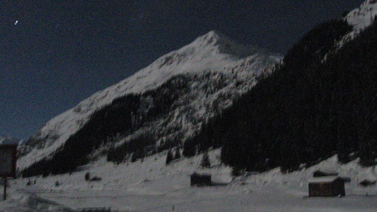 Börterhorn, Nachtaufnahme bei Vollmond von Gulerigen Hus aus